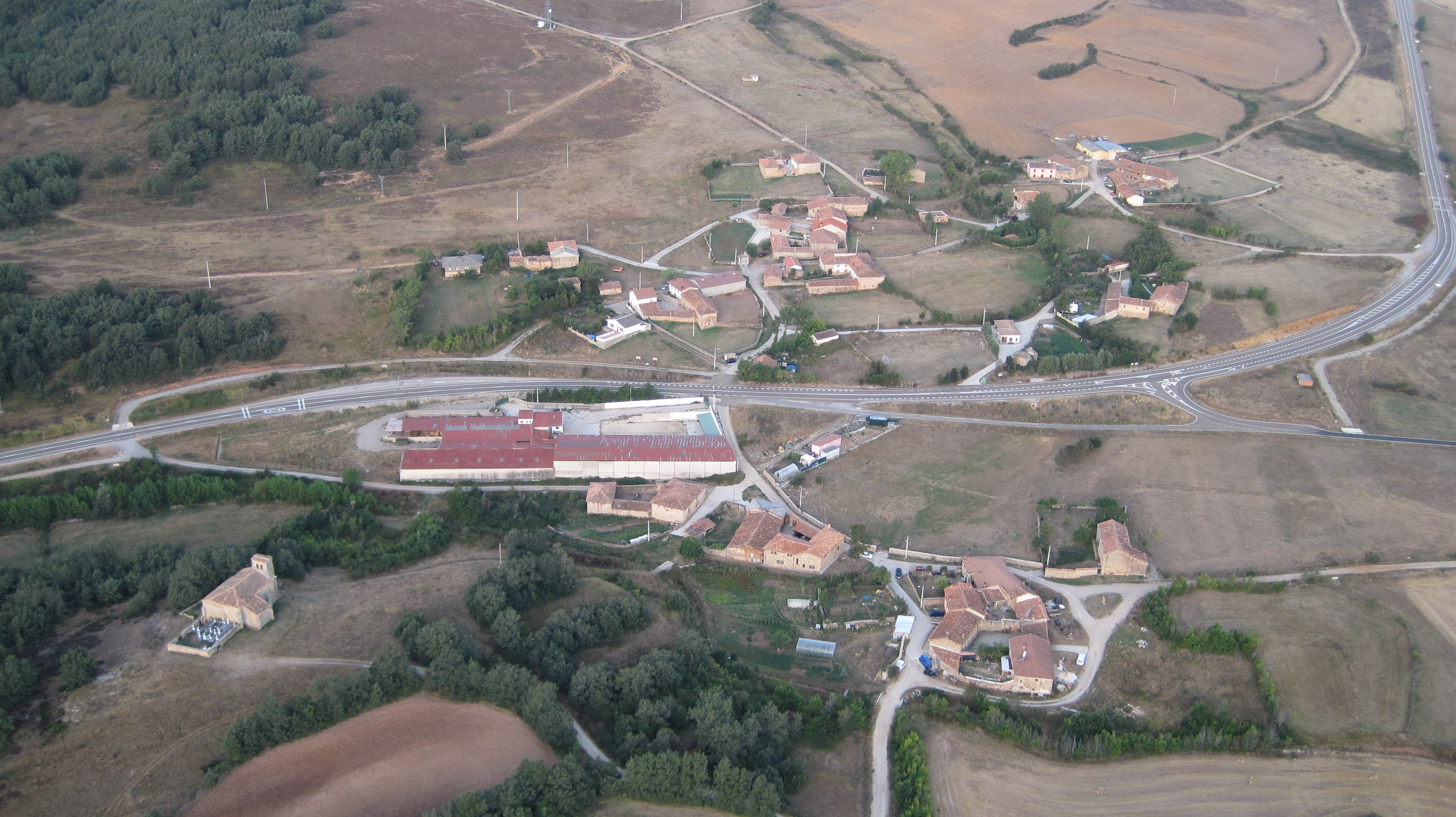 Vista aérea de Matamorisca (Aguilar de Campoo, Palencia, España).